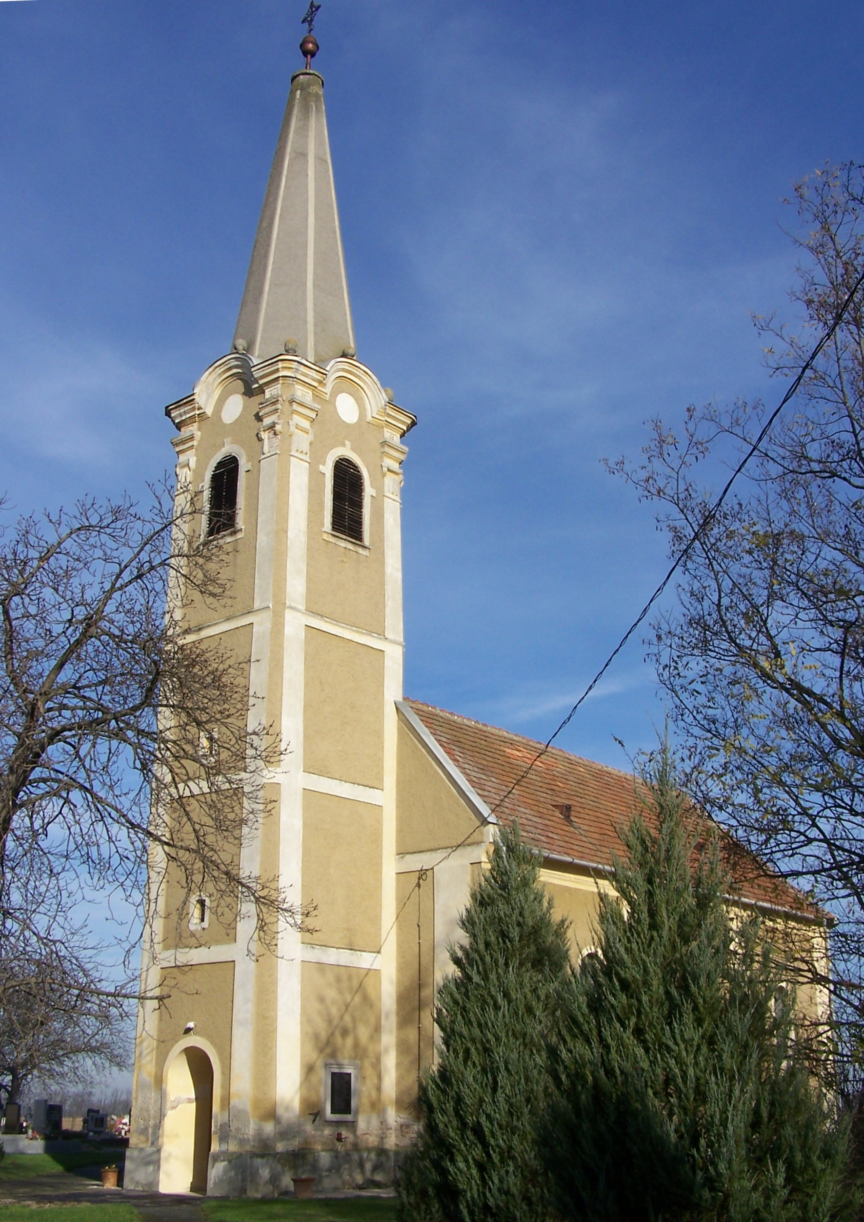 Szent Bertalan római katolikus templom (Maglóca, Petőfi Sándor utca) This is a photo of a monument in Hungary, Identifier: 4509